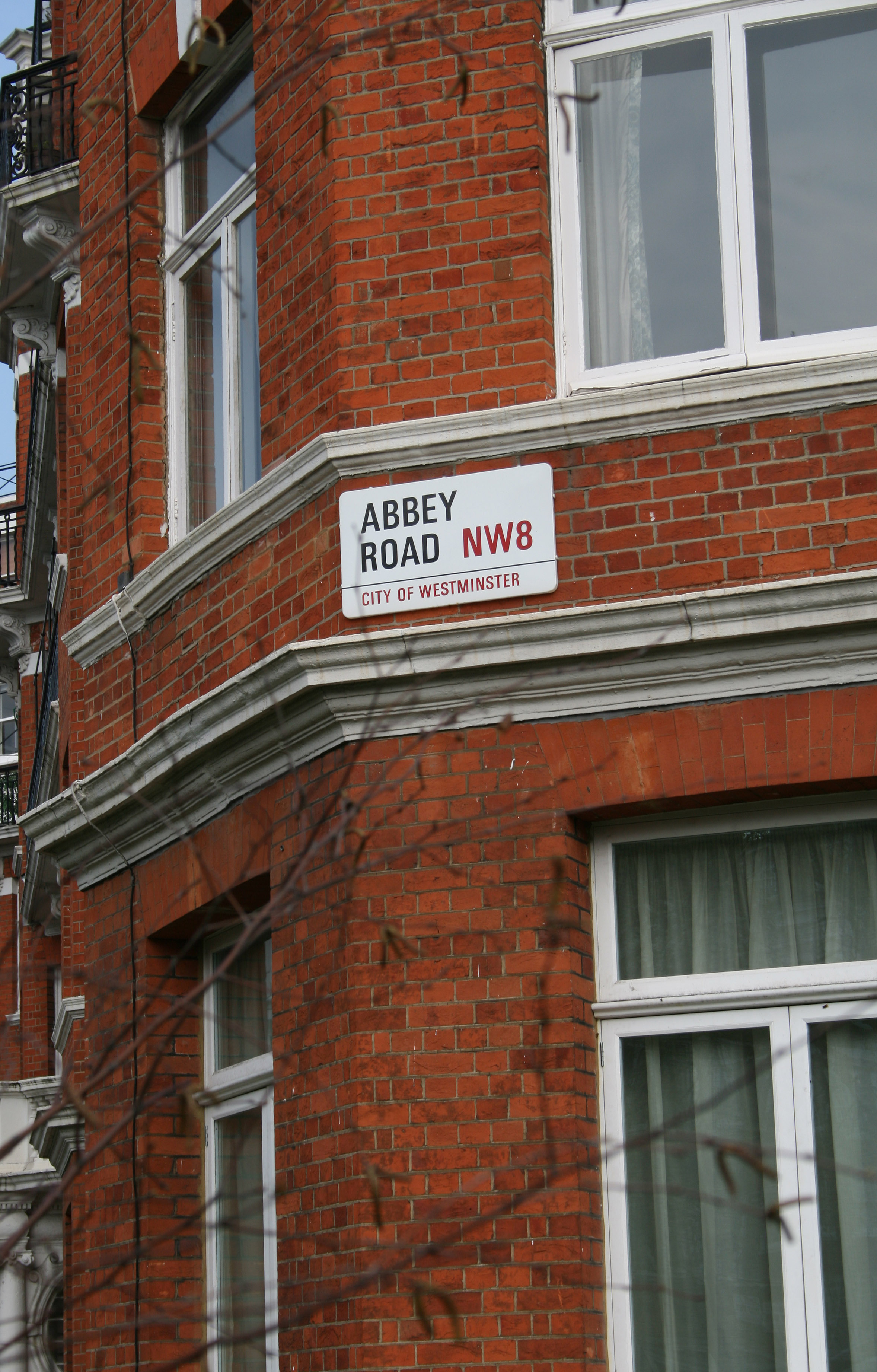 Abbey Road sign